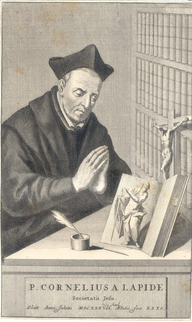 Gravure du père Cornelius a Lapide, tirée de l'album de Alfred HAMY 'Galerie illustrée de la Compagnie de Jésus', 1893.